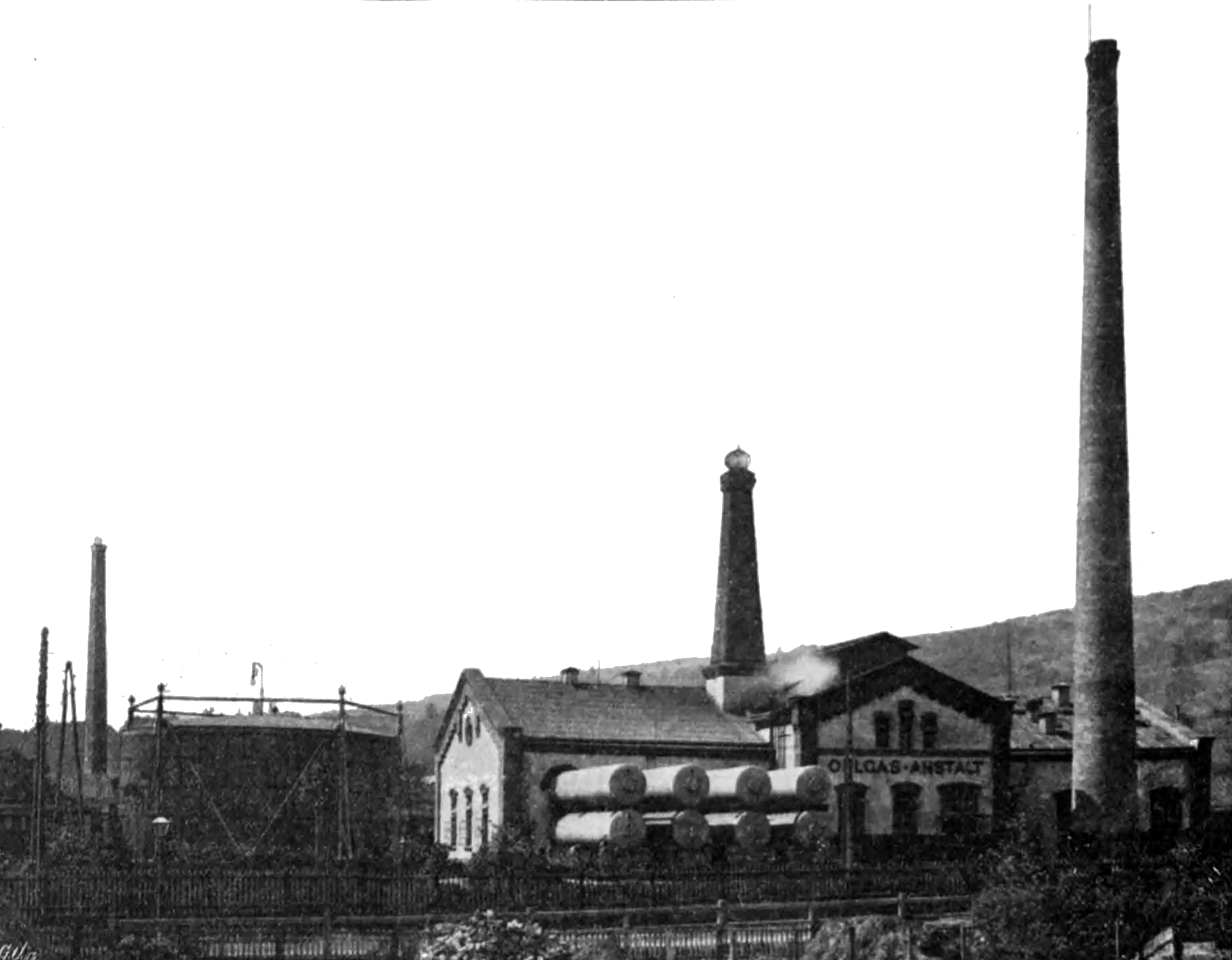 Wien-Hütteldorf, Bahnhofareal, Oelgas-Anstalt